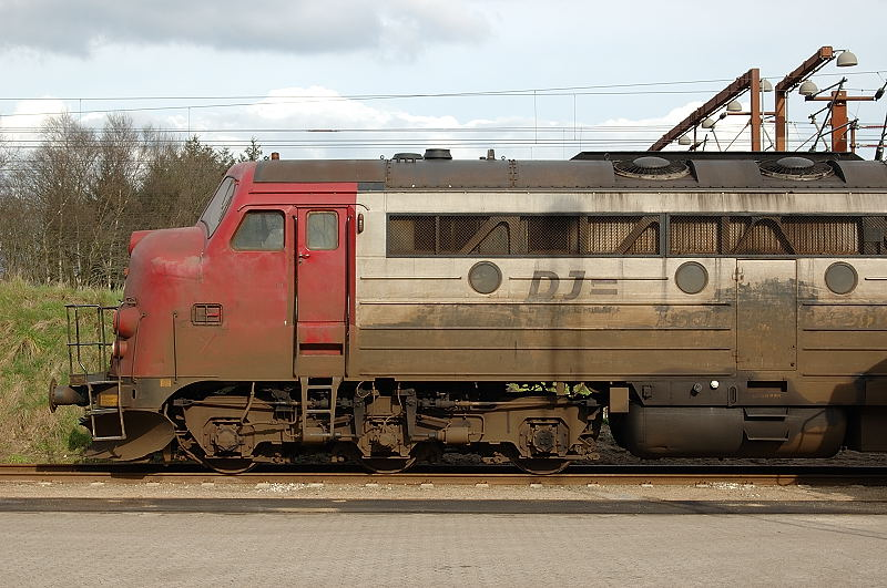 Former Dansk Jernbane MY1158 (taken over by CFL Cargo Danmark) at Padborg, Denmark